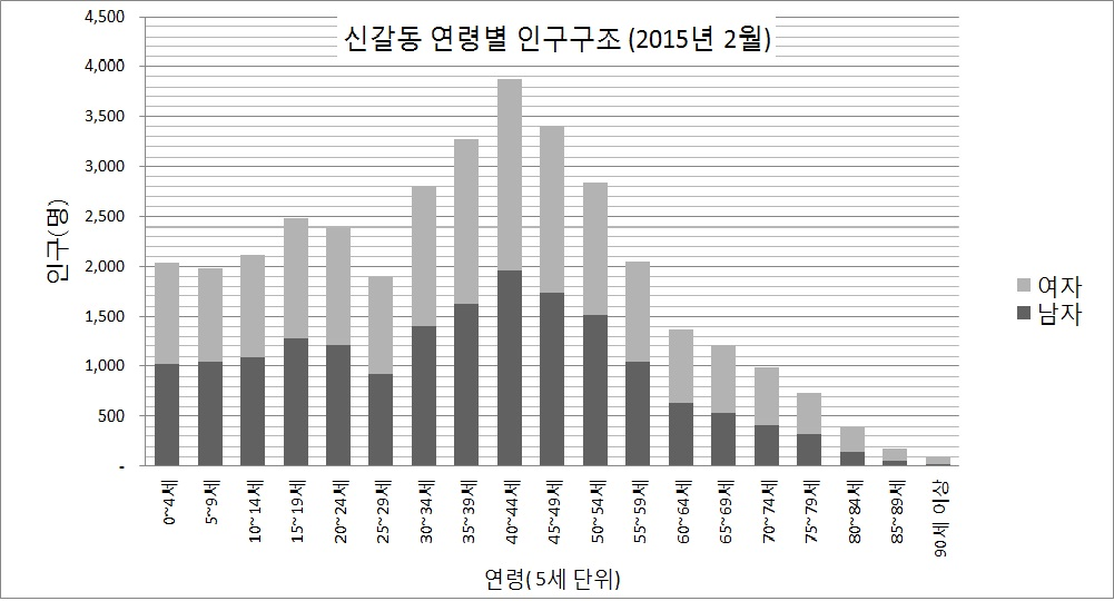 조선말: 용인시 신갈동 연령별 인구구조(2015년 2월)